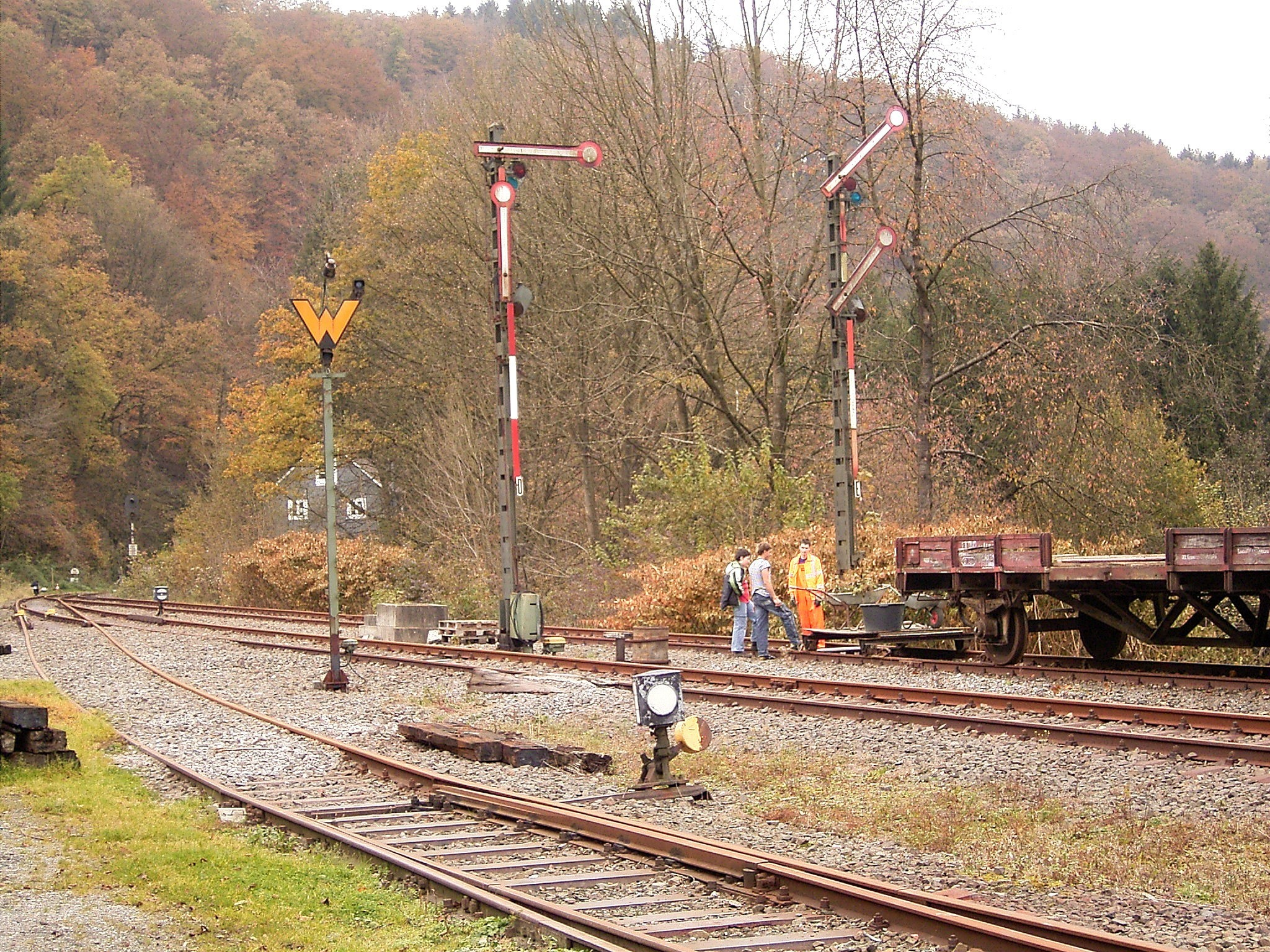 Radevormwald